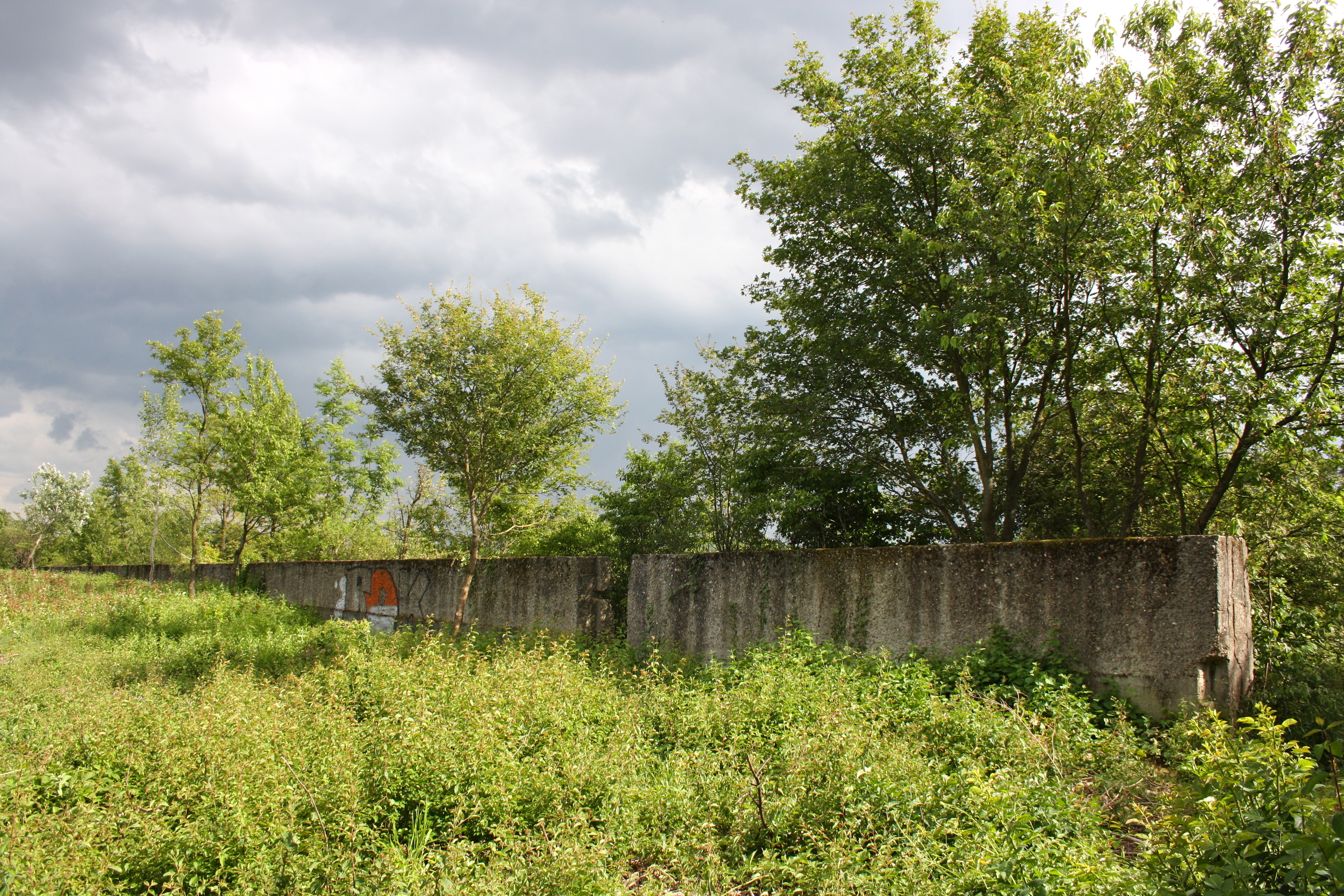 Mauer der Luftnachrichtentruppen-Kaserne in Wien-Mauer.